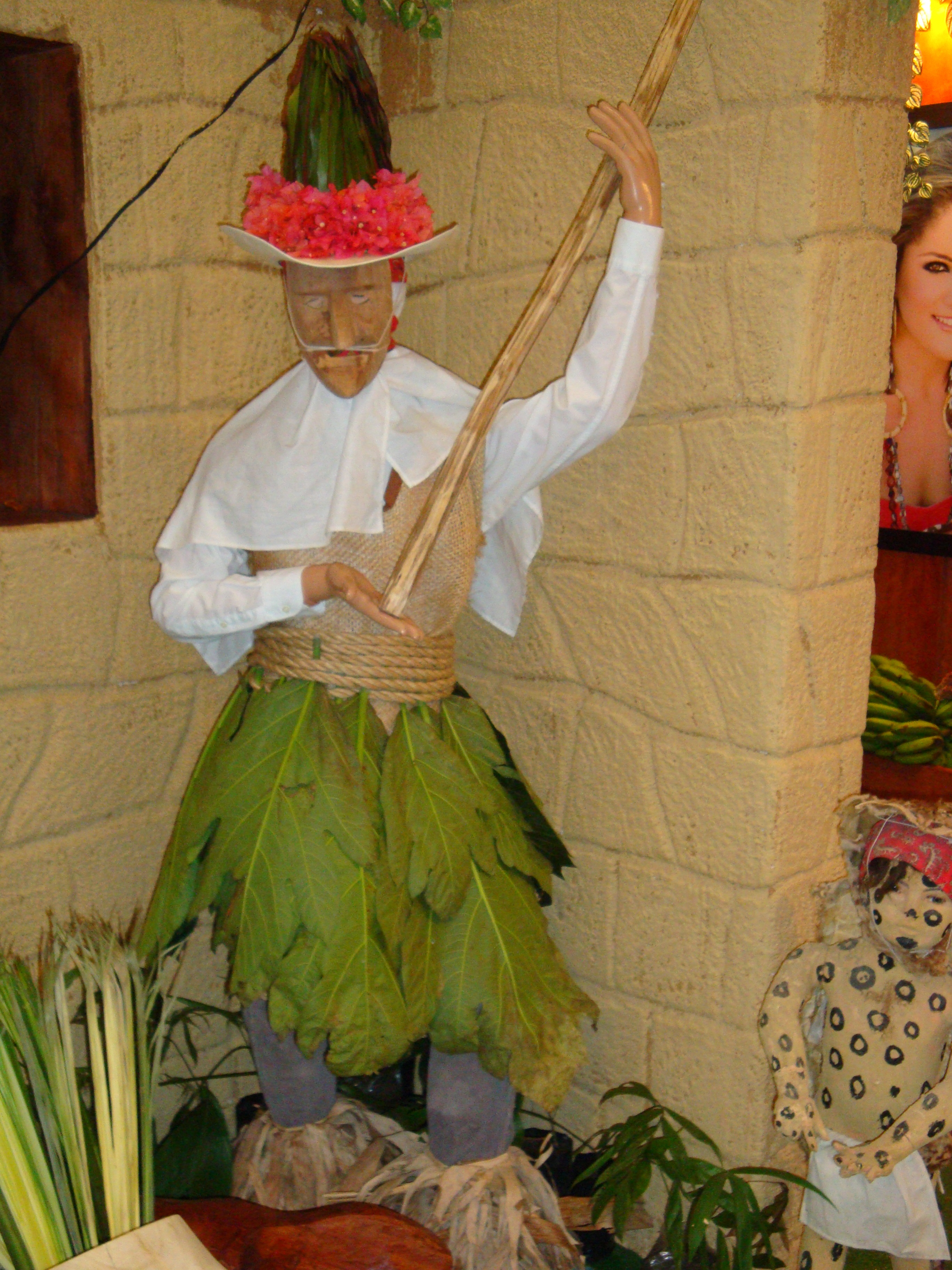 Indumentaria típica de los Cojoes, personajes de la danza del Pochó, en Tenosique, Tabasco, México.